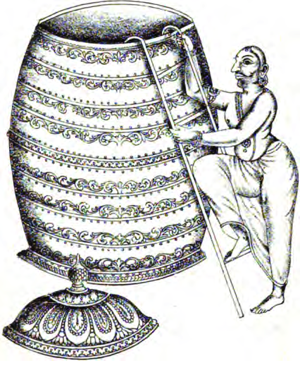 Marthanda Vurmah Maha Rajah entering the Golden Tub